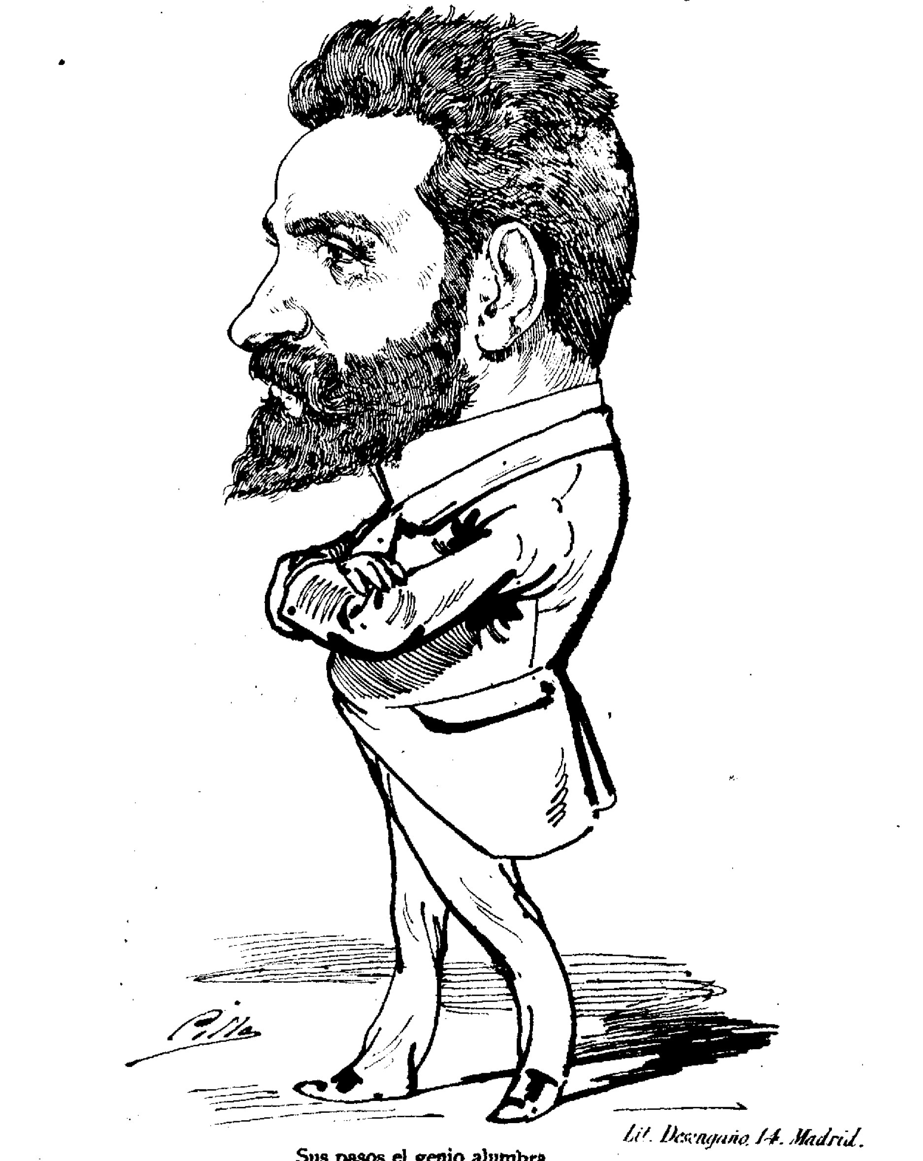 Madrid Cómico, 24 de junio de 1883.